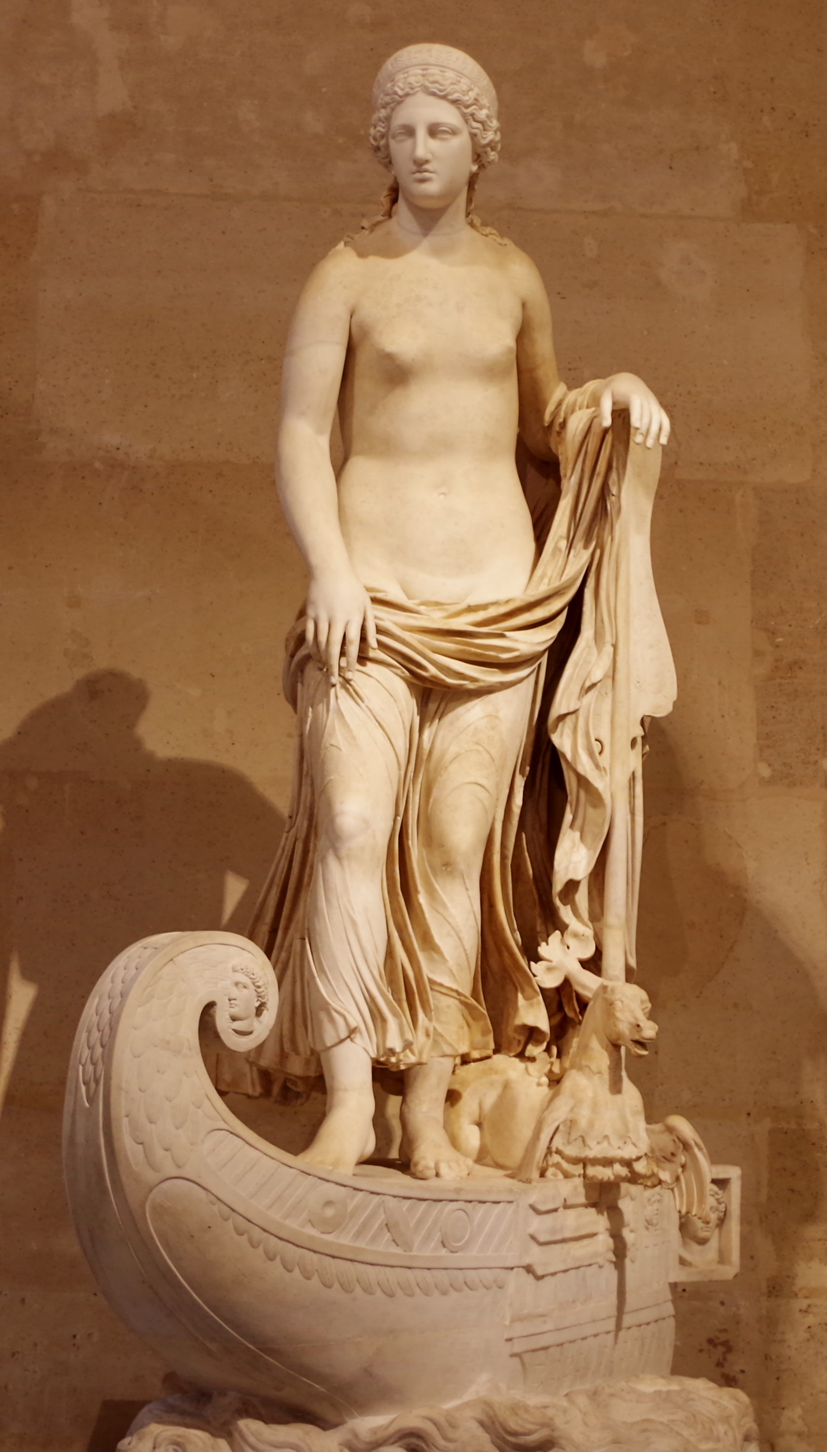 Thétis - Ma 2344 - Louvre